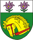 Znak obce Grygov